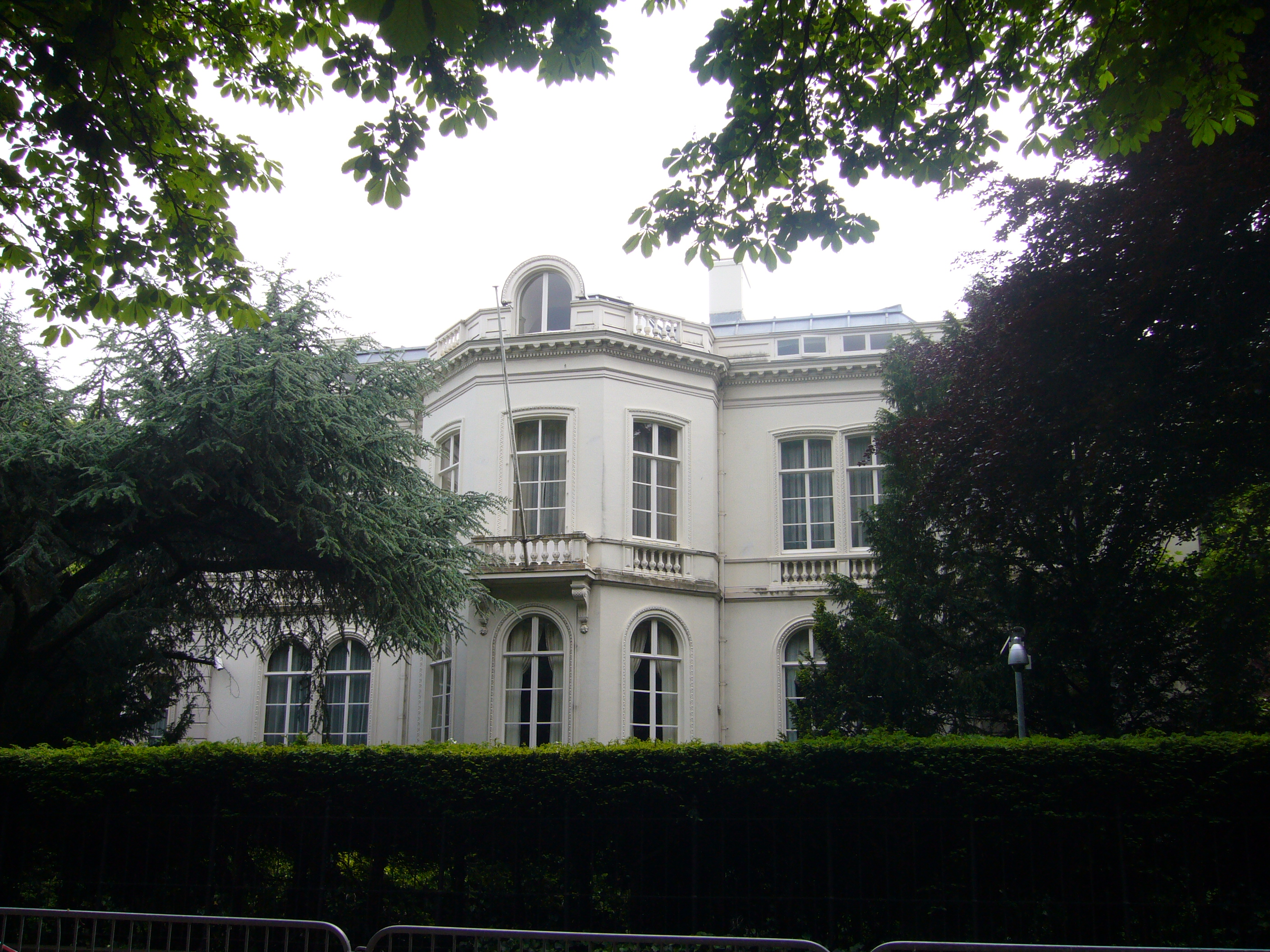 Plein 1813 nr 1, residentie van de Britse ambassadeur, in Willemspark, Den Haag